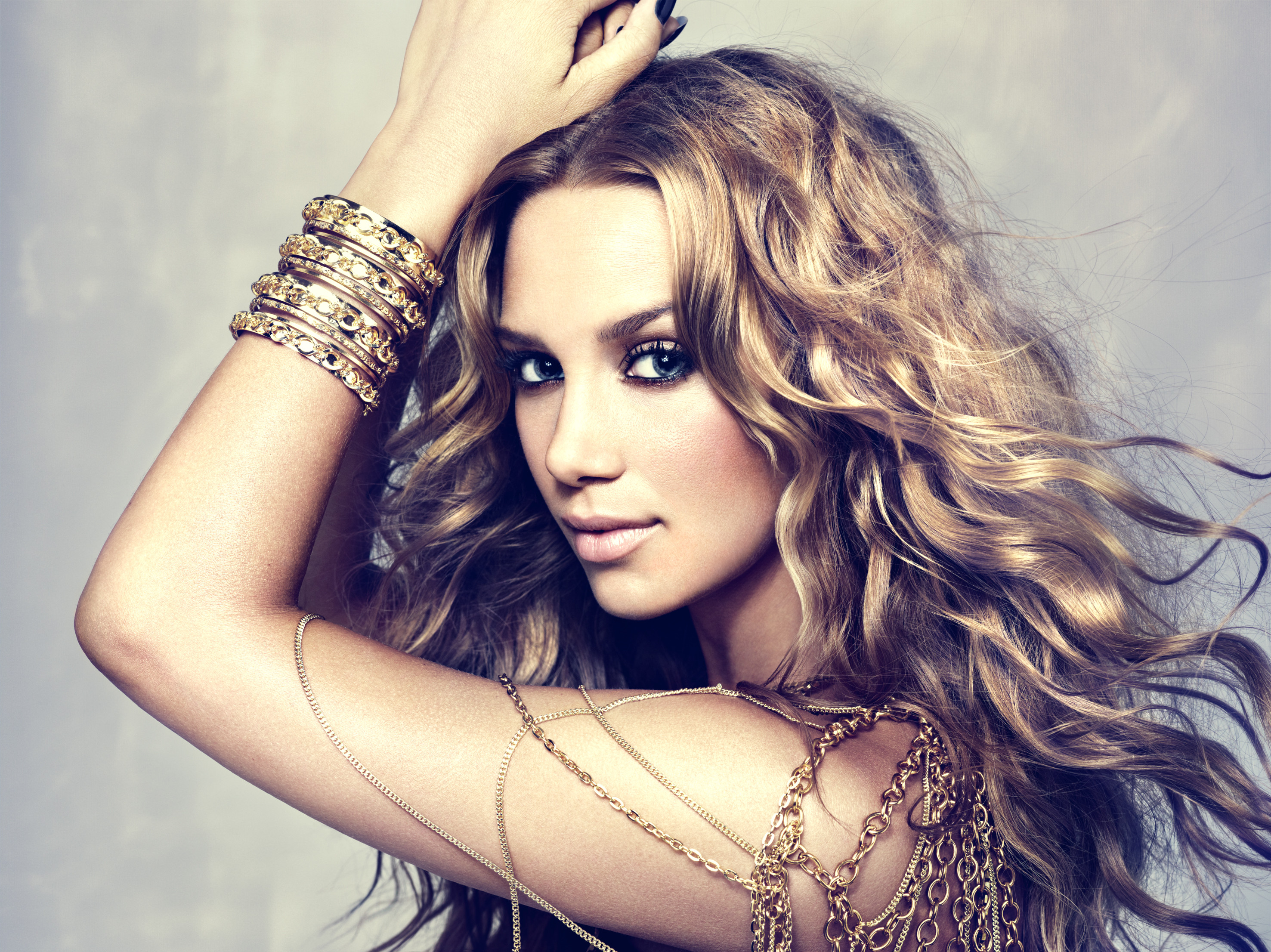 Artisten Agnes Carlsson.